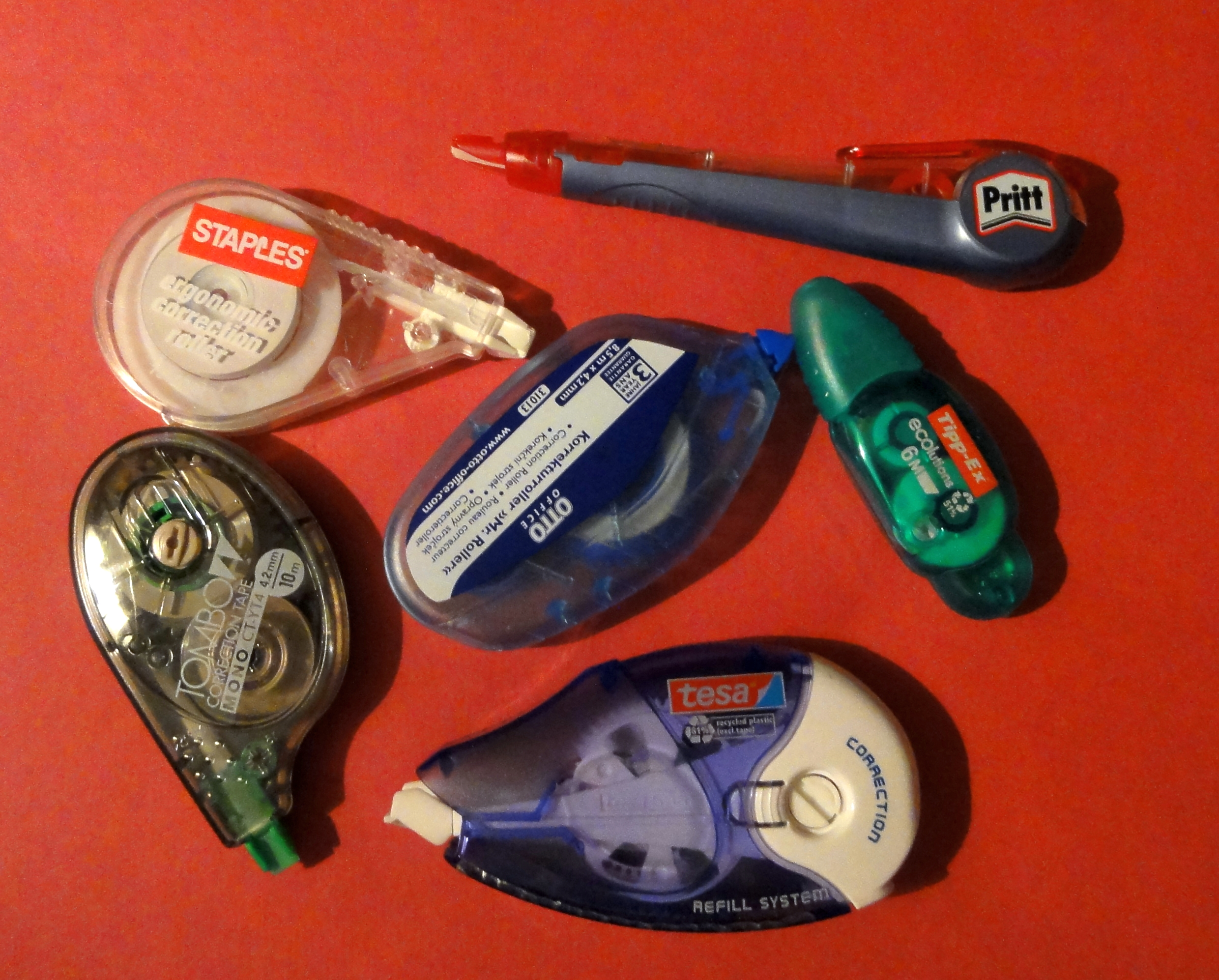 Verschiedene Korrektur(band)abroller